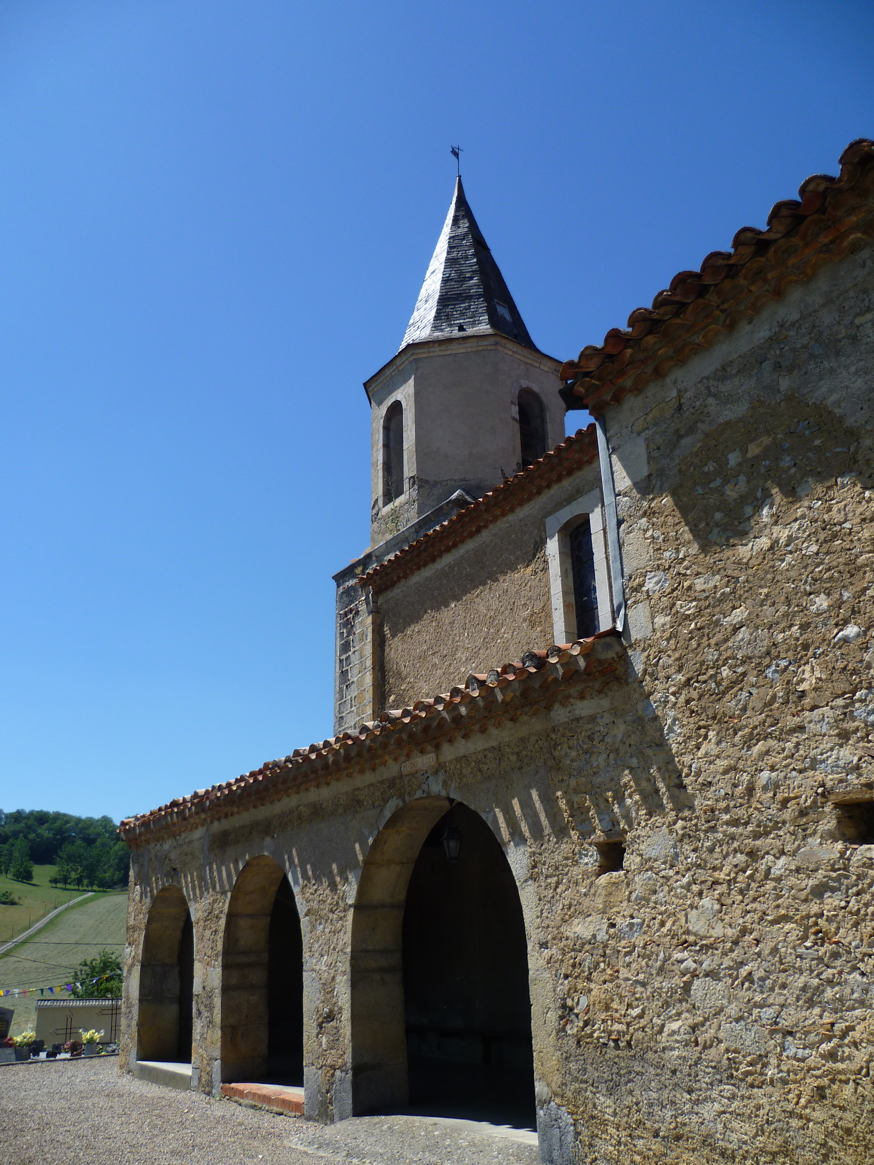 Église de Montesquieu-Avantès (Ariège, France).